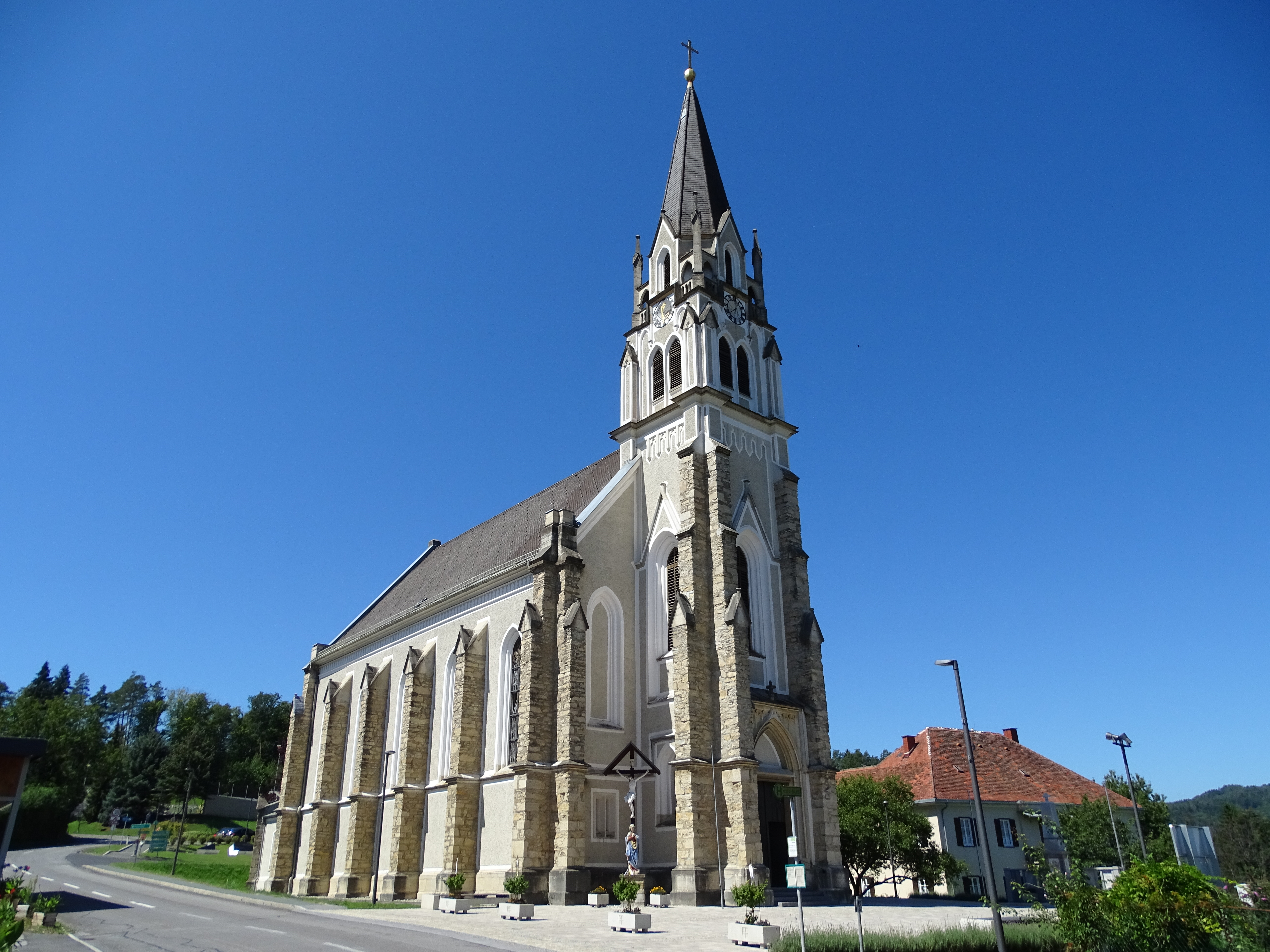 Die katholische Pfarrkirche von Sankt Bartholomä in der Steiermark